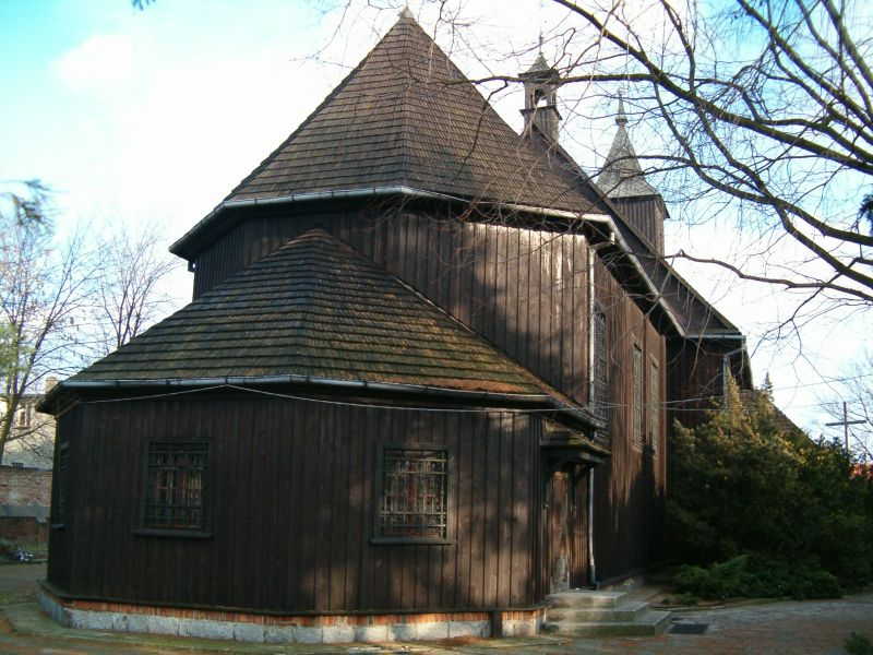 Polska, Kościół parafialny pw. Św. Tekli w Dobrzycy, powiat pleszewski, woj. wielkopolskie., widok za zakrystię.